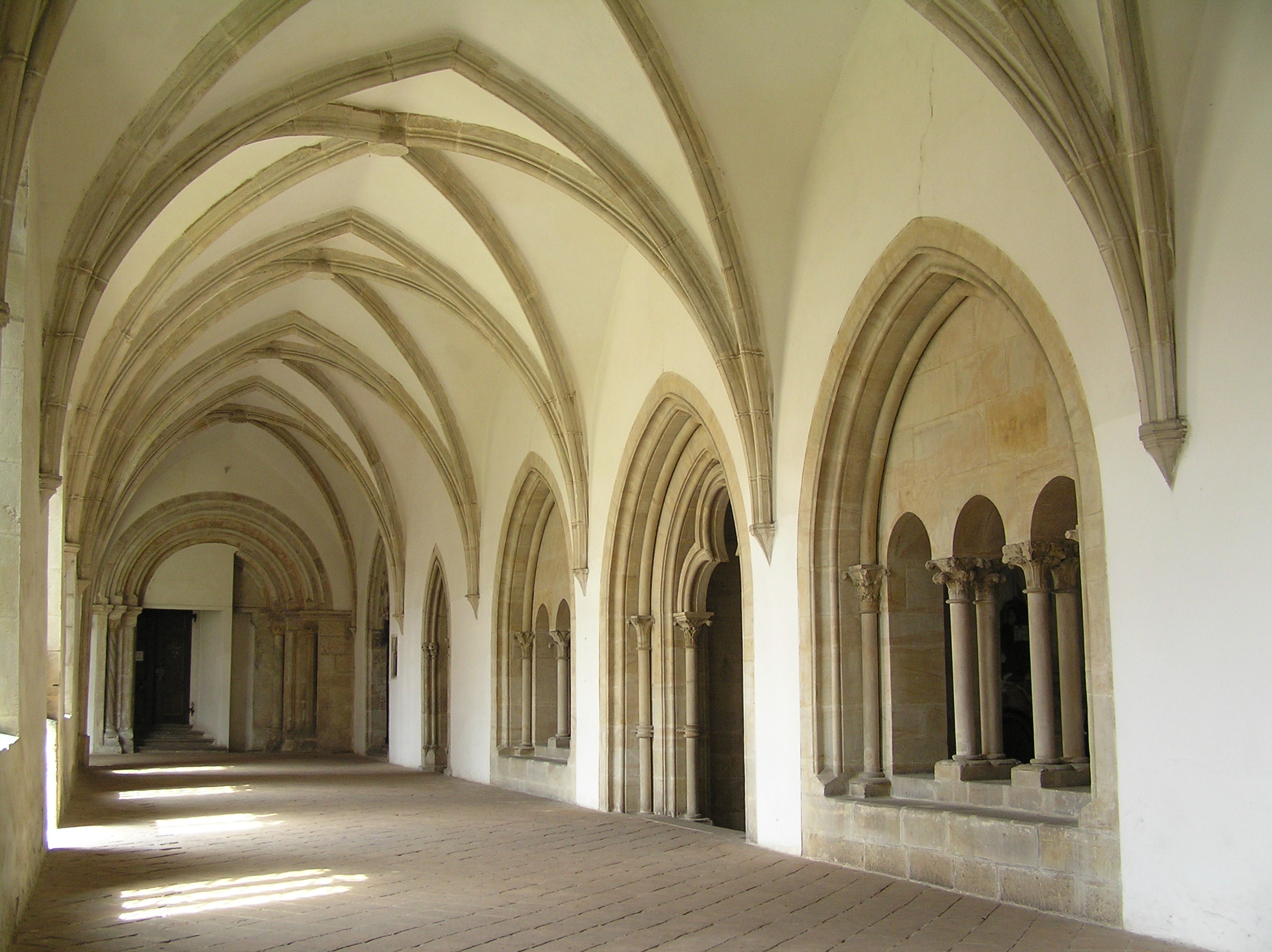 Klášter cisterciáků (Osek), Osek 486